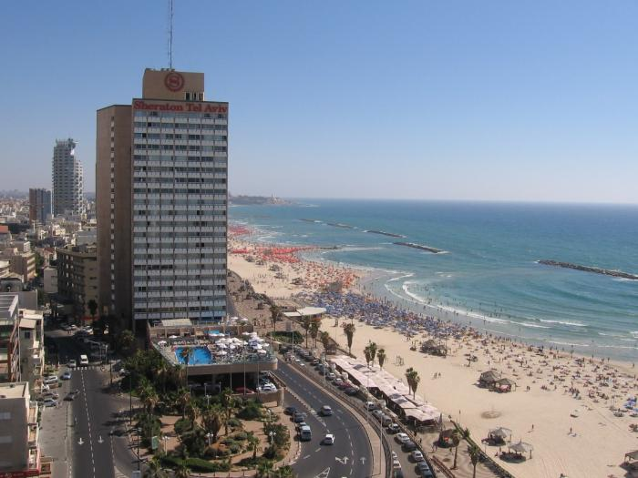 בתי המלון בטיילת.